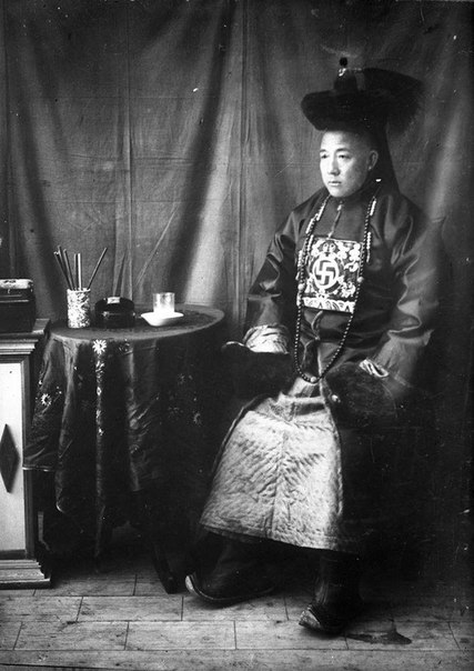 Монгол: Засагт Хан Доржпаламын Содномравдан. энэ фото зургийг оросын эзэн хааны жанжин штабын ахлах офицер Газар зүйн нийгэмлэгийн судалгааны нэрийн дор монголд ирэх үедээ авсан. оросын архивт хадгалагдаж байна.